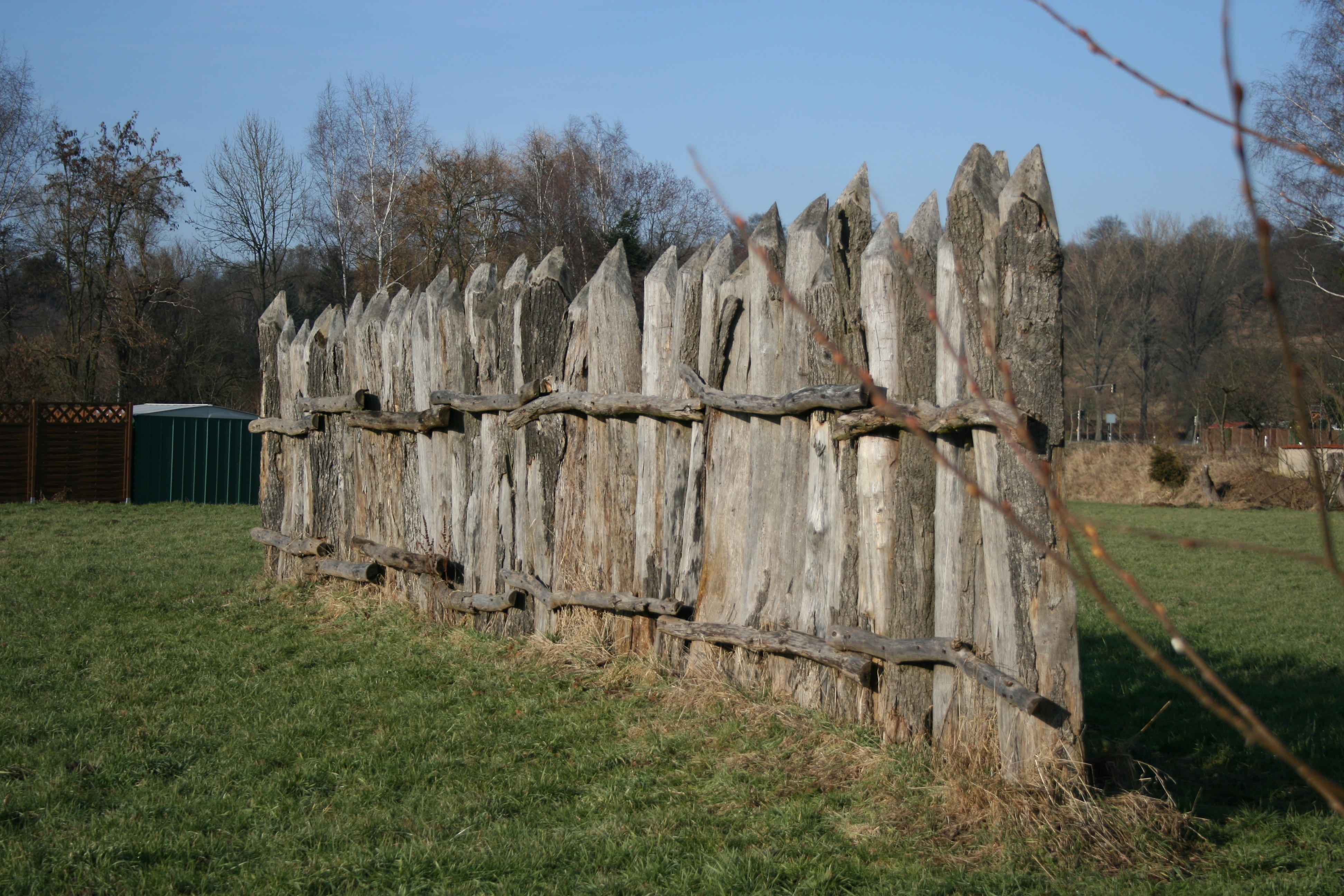 Rekonstruierte Limespalisade beim Kastell Marköbel.